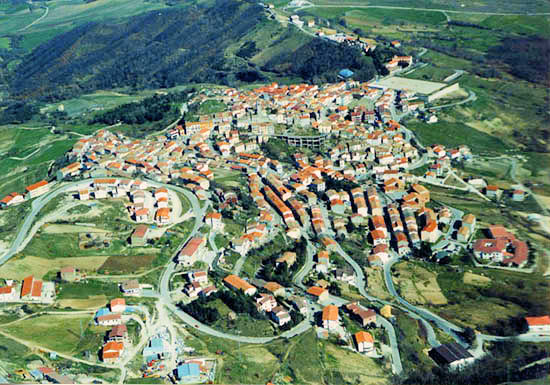 Foto scattata da me, opera propria, panorama di Montefalcone V.F., licenza pubblico dominio